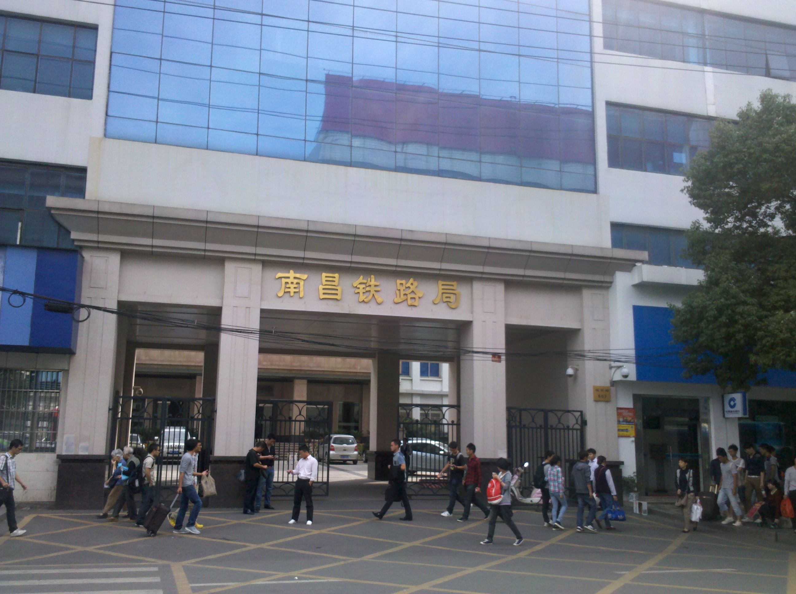 南昌铁路局总部